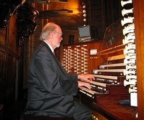 Jean-Pierre Leguay aux grandes orgues de la Cathédrale Notre-Dame de Paris.